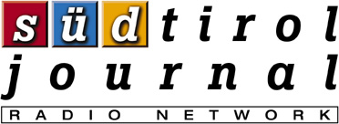 Loga von Südtirol Journal